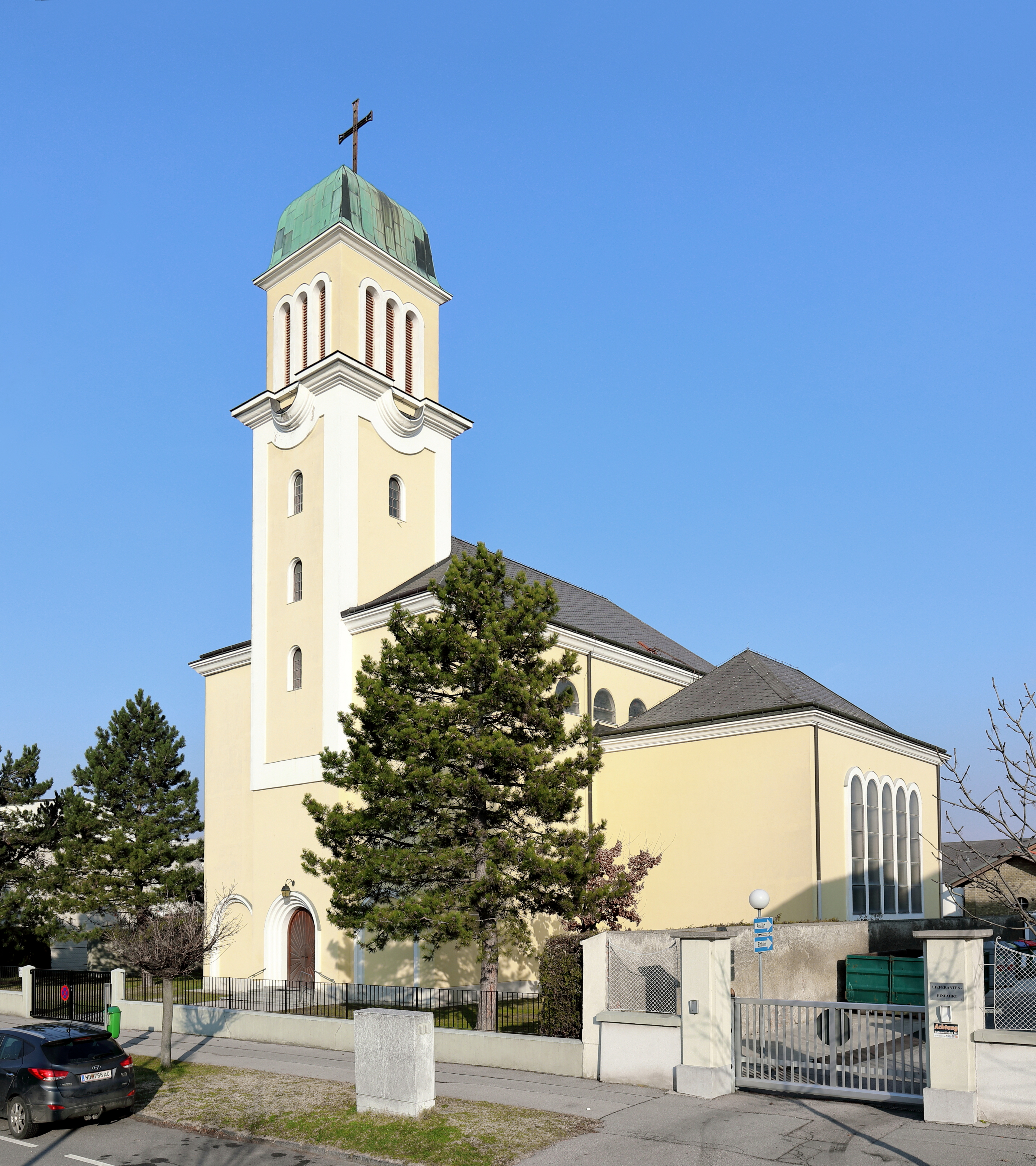 Südwestansicht der röm.-kath. Pfarrkirche zur Kreuzerhöhung in der burgenländischen Marktgemeinde Kittsee.Die dreischiffige Kirche hat einen rd. 36 m hohen (inklusive Kreuz) eingebundenem Westturm mit haubenförmigem Helm und eine halbrunde Apsis. Die Kirche mit einem Fassungsraum für rund 1250 Personen wurde nach den Plänen der Architektin Helene Koller-Buchwieser vom Baumeister Stefan Wilhelm Haderer ab 1948 errichtet und am 16. Nov. 1952 von Bischof Josef Schoiswohl eingeweiht.